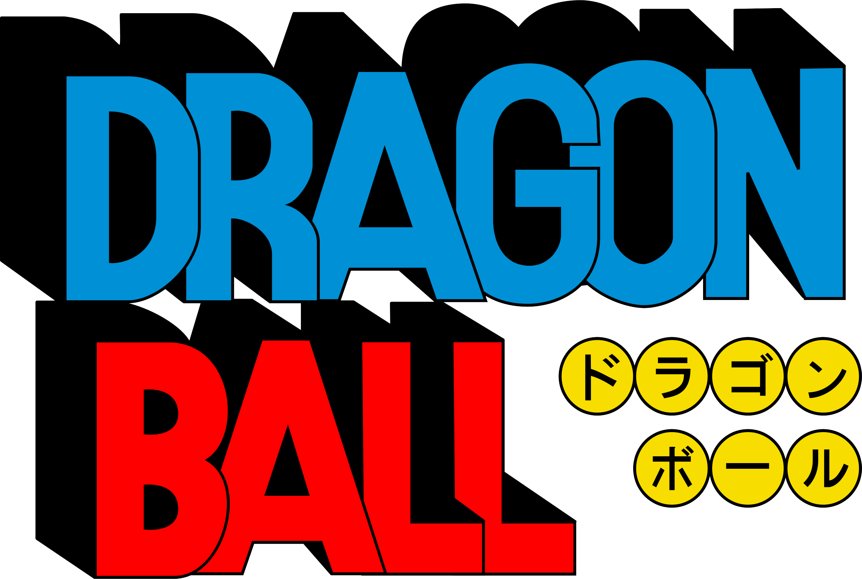 Dragon Ball Logo